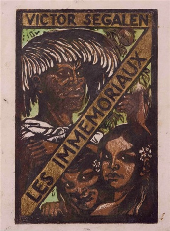 Titre pour Victor Segalen, Les Immémoriaux